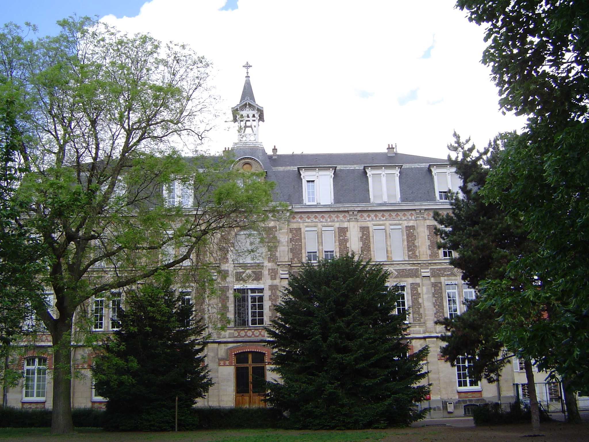 Maison Saint-Jean, Antony, Hauts-de-Seine, Île-de-France, France